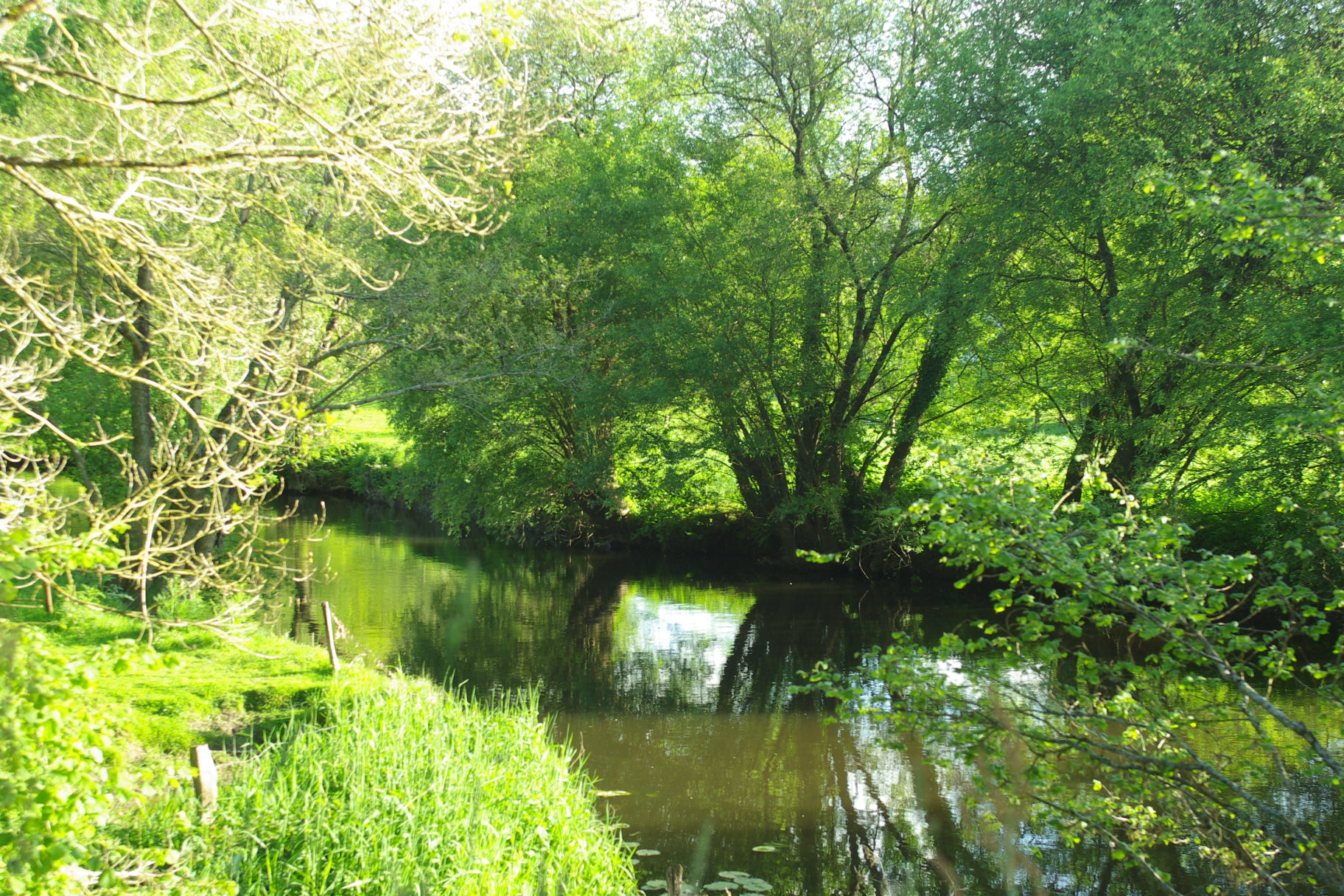 L'Ével a quelques mètres de son embouchure sur le Blavet